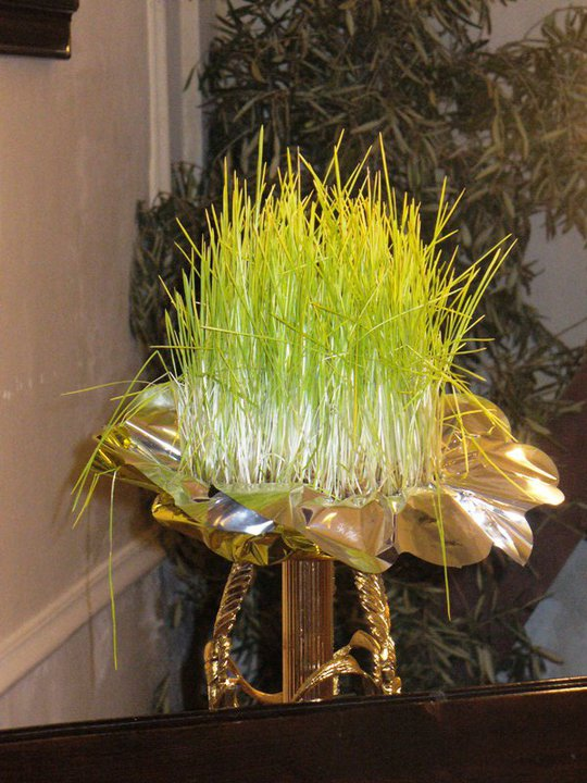 "lavureddu" tradizionale addobbo per l'altare della reposizione in Sicilia